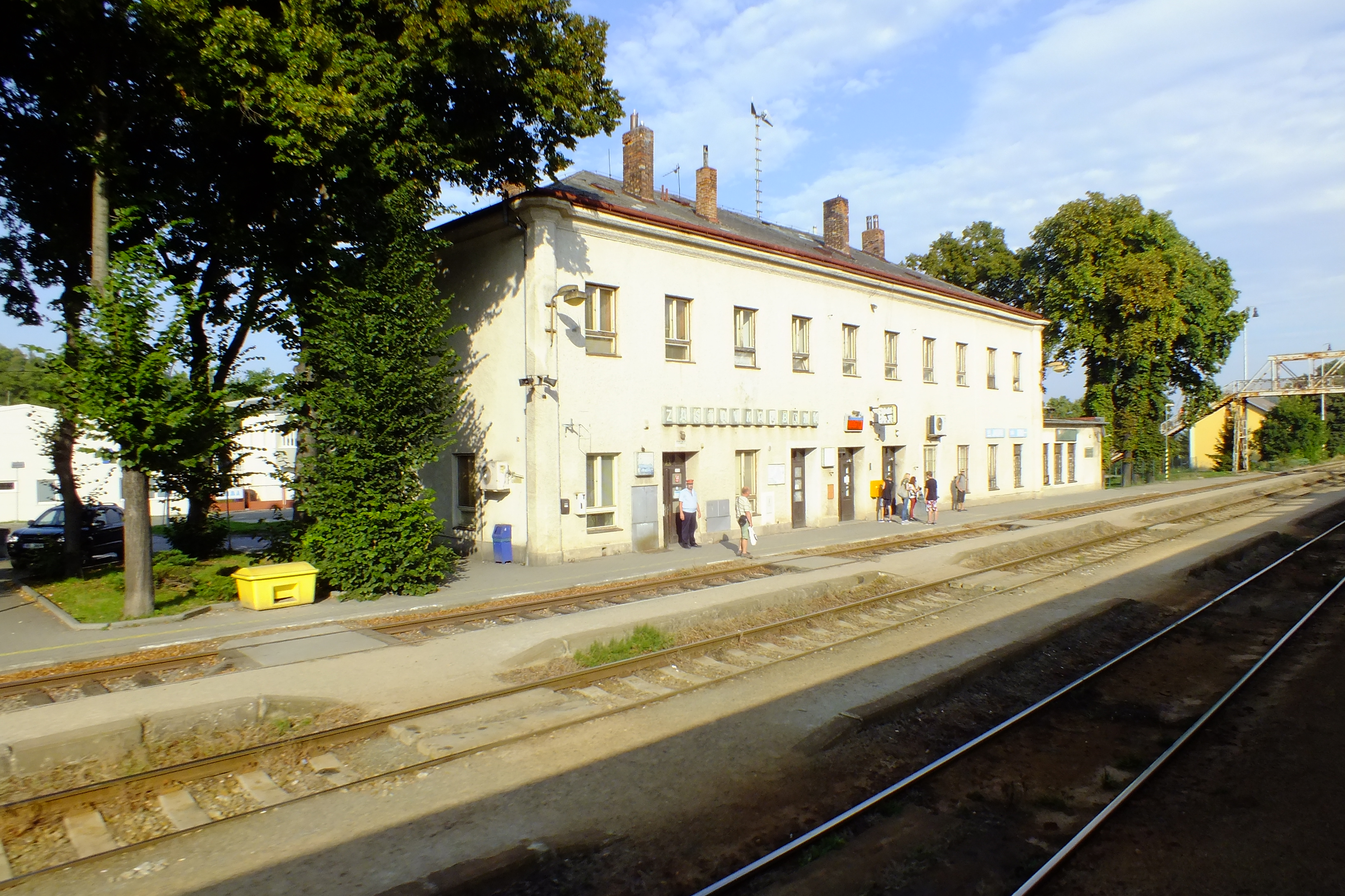 Staniční budova